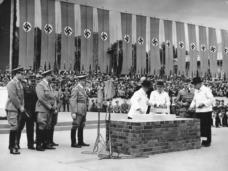 Berlin, Grundsteinlegung Haus des Fremdenverkehrs Die Grundsteinlegung zum Haus des deutschen Fremdenverkehrs am "Runden Platz" durch den Führer. Die Kassette mit den Urkunden wird in den Grundstein eingemauert, links der Führer, Reichsminister Dr. Goebbels, Staatsminister Esser, Prof. Speer. 14.6.1938 [Berlin, Runder Platz.- Grundsteinlegung zum "Haus des Deutschen Fremdenverkehrs", Adolf Hitler, Joseph Goebbels, Hermann Esser, Albert Speer, im Hintergrund Zuschauertribüne, dahinter Hakenkreuzflaggen] Abgebildete Personen: Hitler, Adolf: Reichskanzler, Deutschland Goebbels, Joseph: Reichsminister für Volksaufklärung und Propaganda, Gauleiter Berlin, Deutschland Speer, Albert Prof. Dr.: Reichsminister für Rüstung und Kriegsproduktion, Architekt, Deutschland (GND 118615998) Esser, Hermann: Staatsminister, Leiter des deutschen Fremdenverkehrs, Deutschland (GND 122330811)